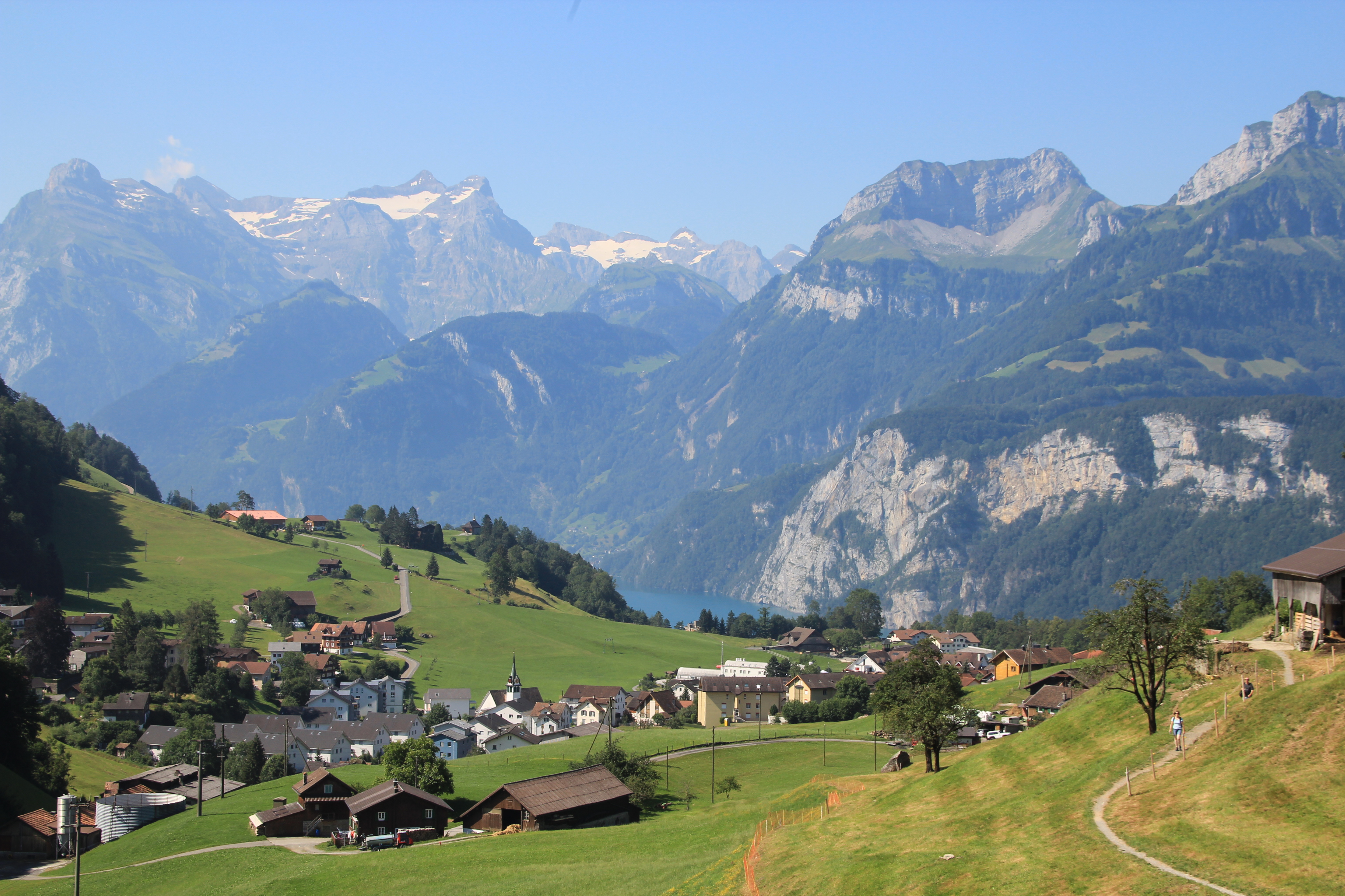 de :Morschach, oberer Dorfteil